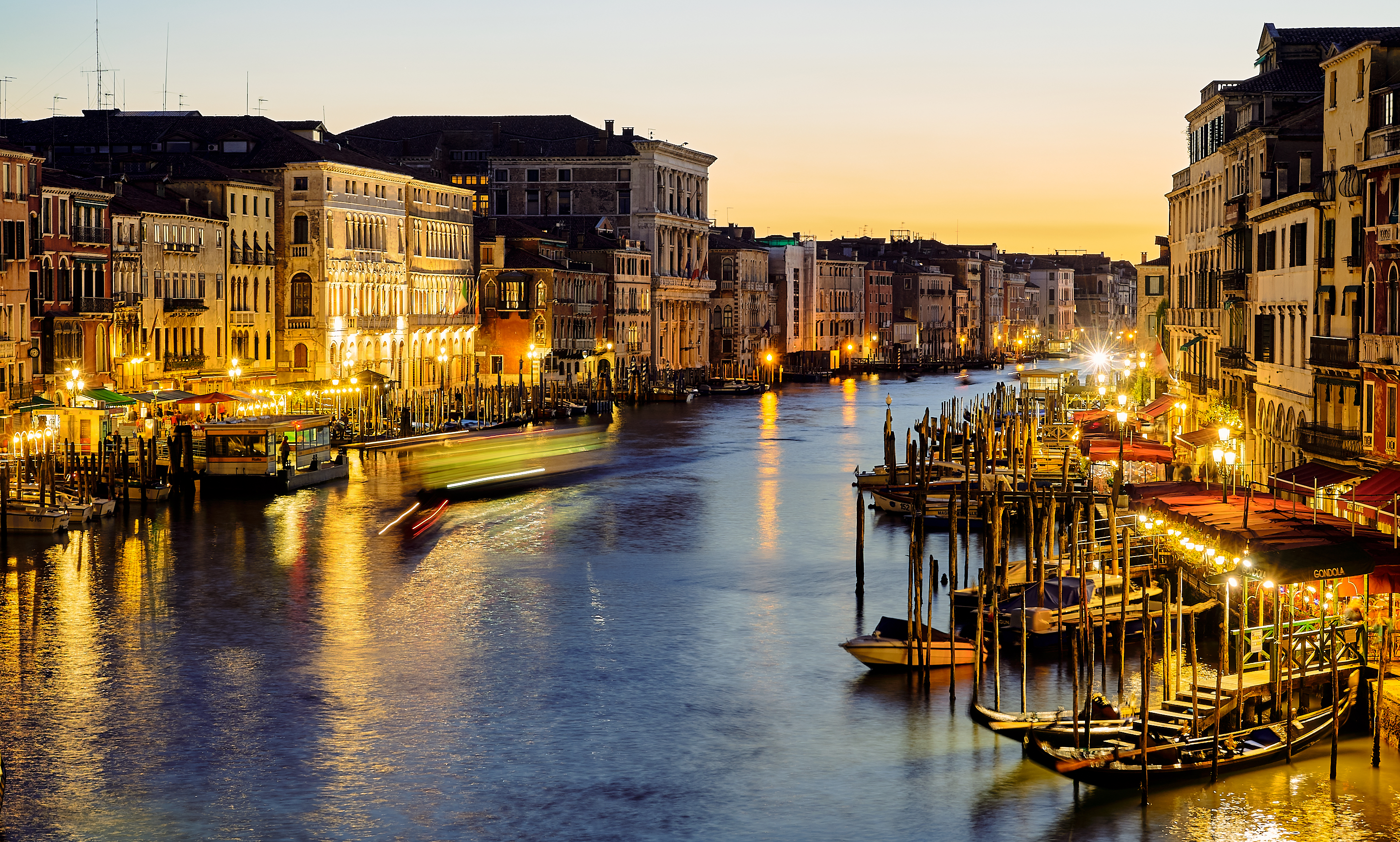 Italy